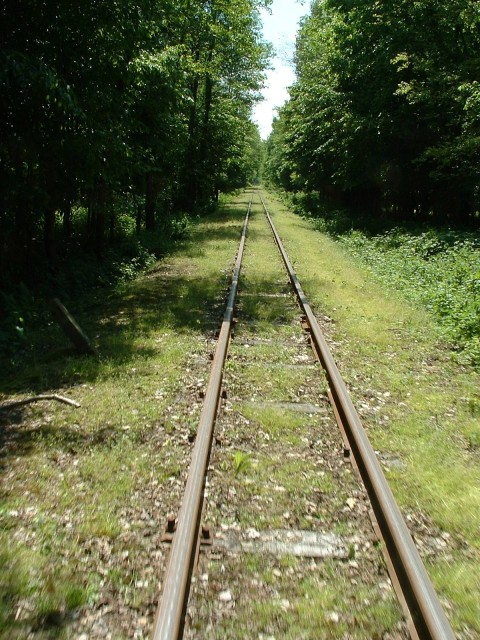 760 mm nyomtávolságú pálya 48-as (I) rendszerű sínekkel felújítva Kaszón (Kaszói Állami Erdei Vasút)